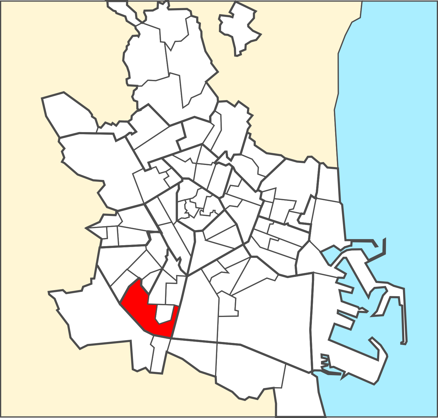 Localització del barri dins de la ciutat de València.